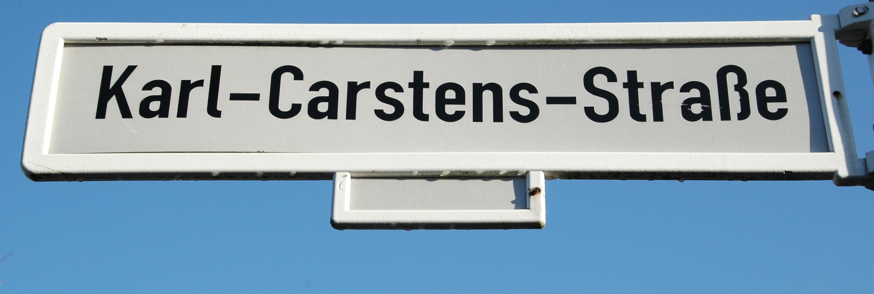 Straßenschild in ehem. Regierungsviertel in Bonn